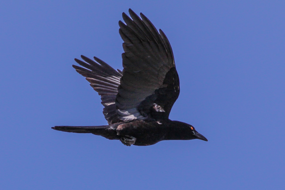 Laguna de Oviedo